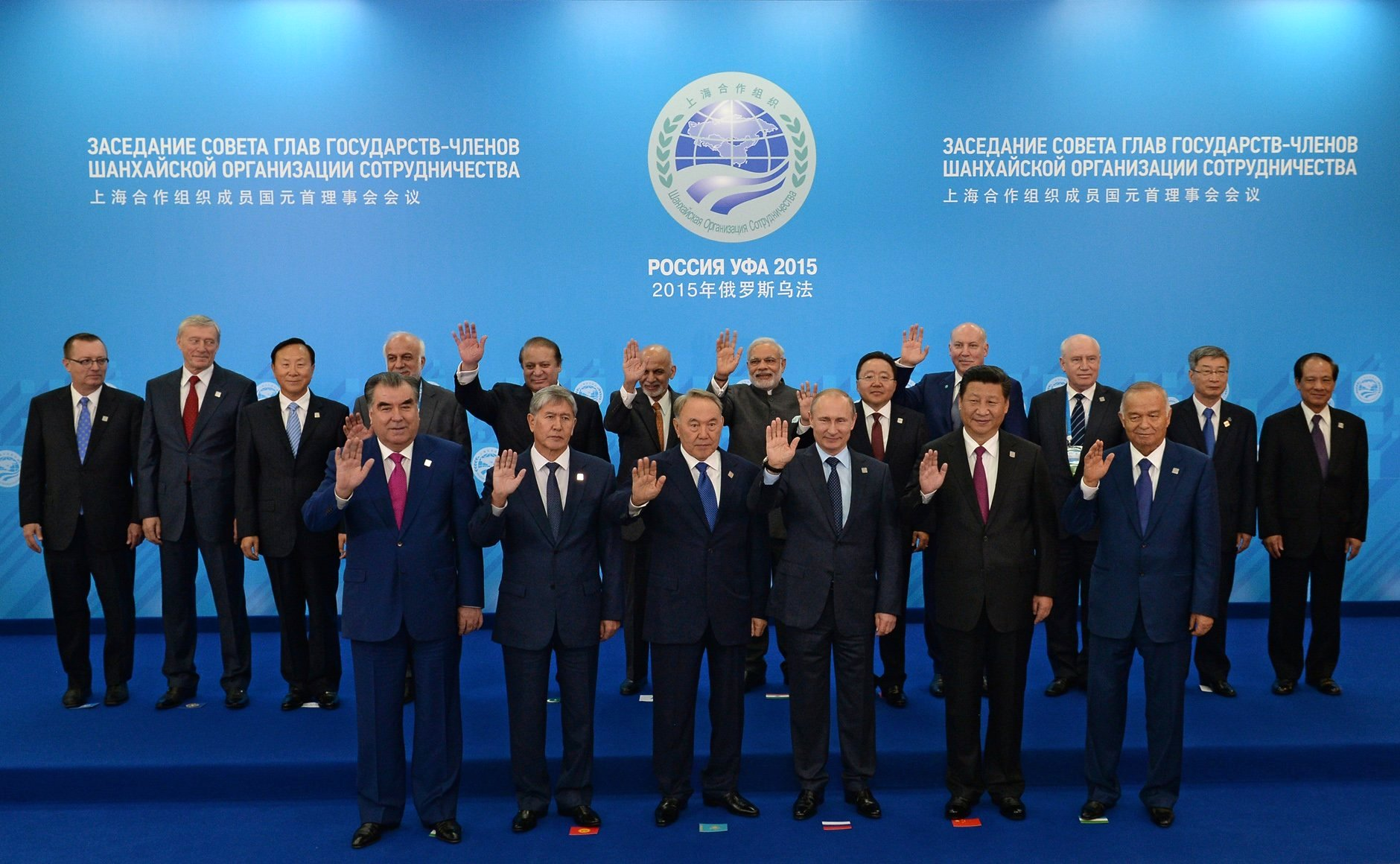 Главы государств – членов Шанхайской организации сотрудничества, главы государств и правительств стран – наблюдателей в ШОС и главы делегаций международных организаций.